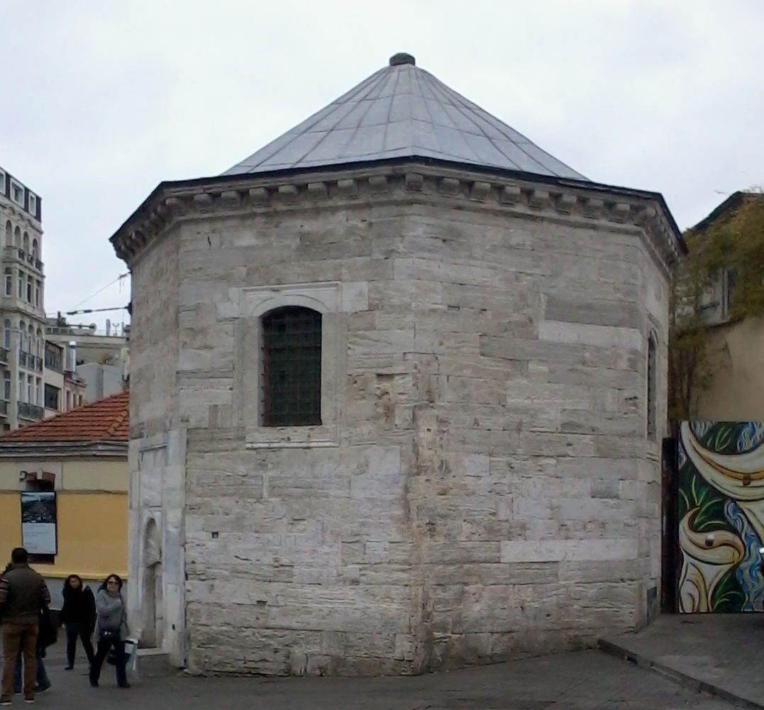 Taksim'deki maksem.